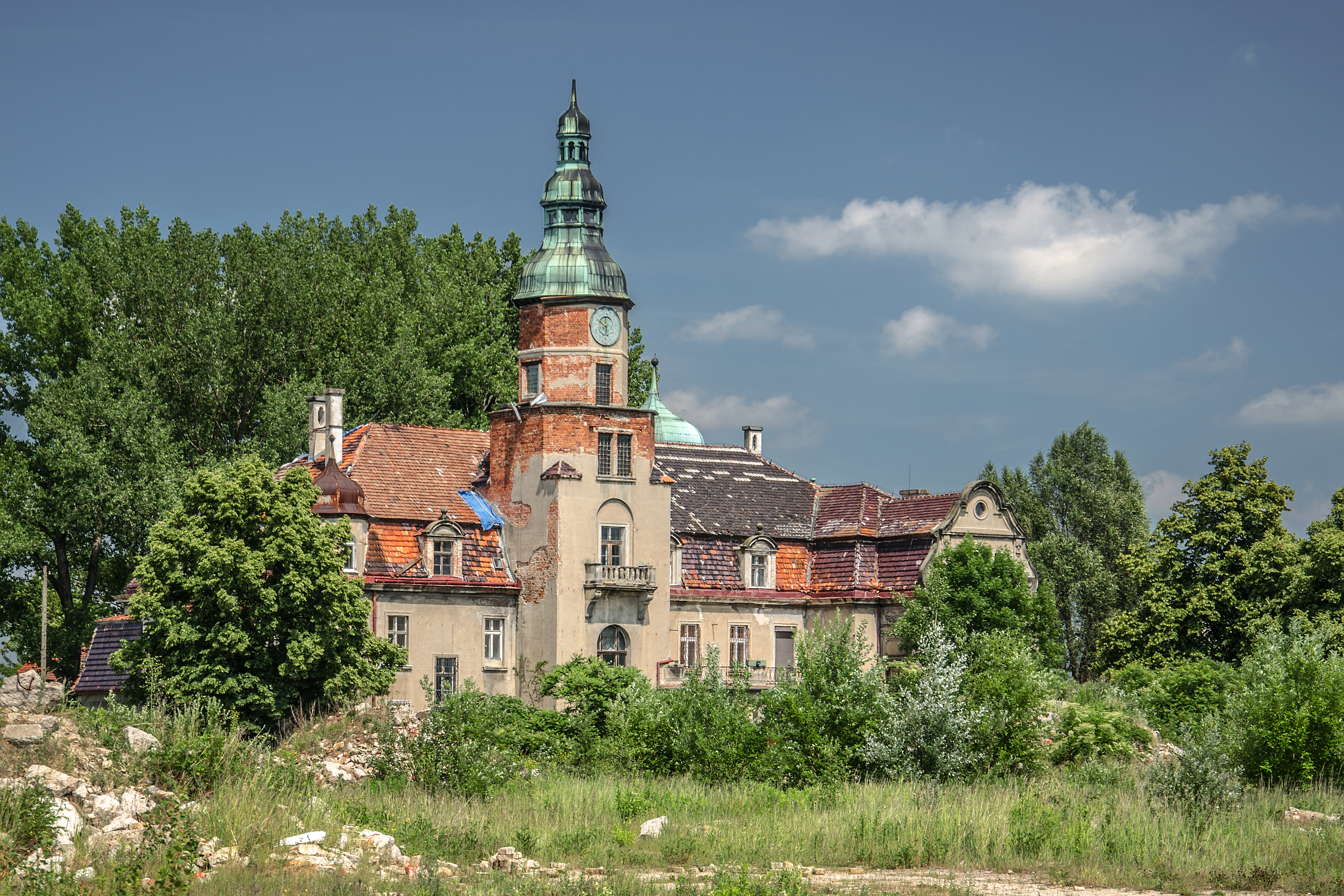 Pustków Żurawski, pałac (nr 1), 1897-1910